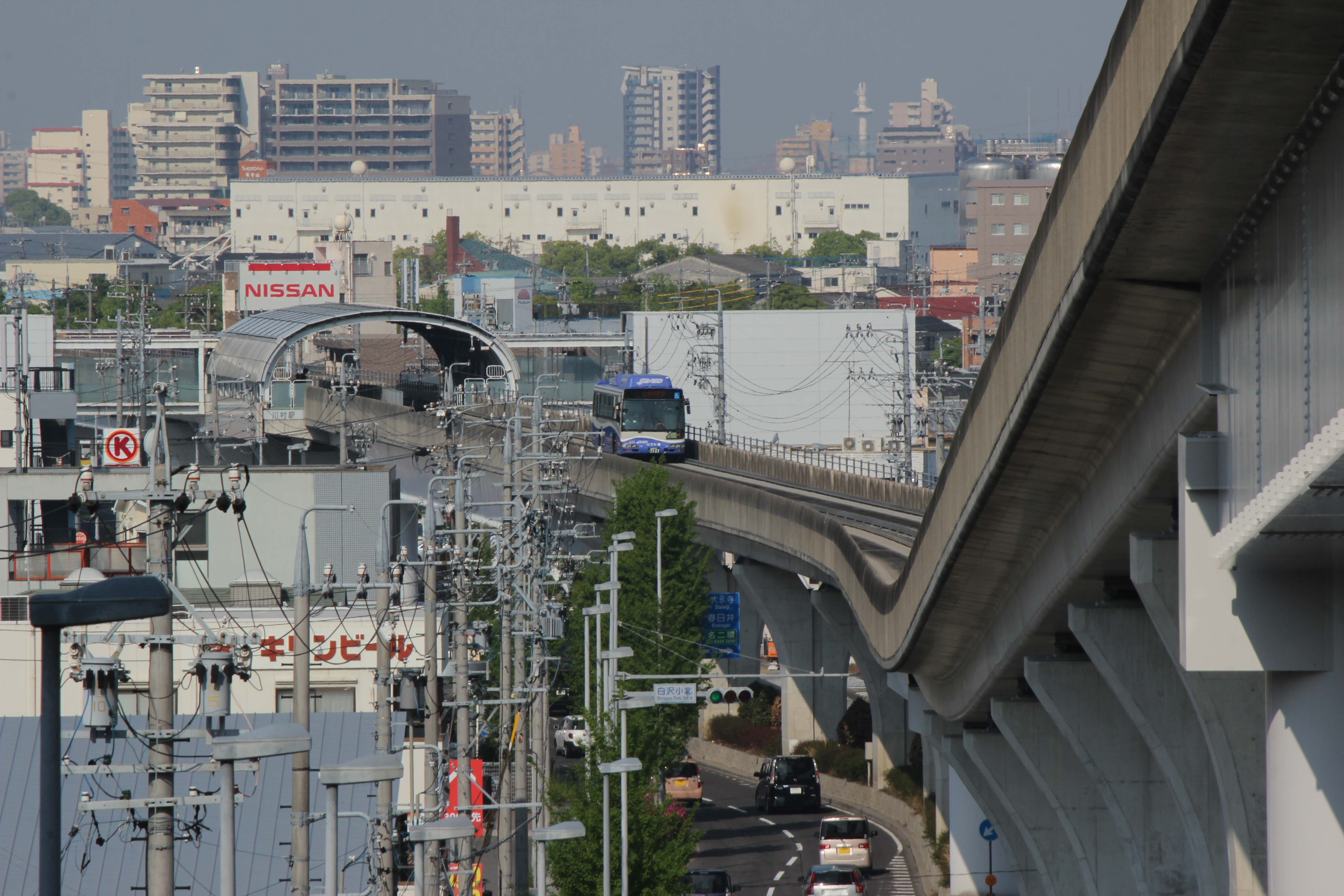 名古屋ガイドウェイバス 川村 - 白沢渓谷間